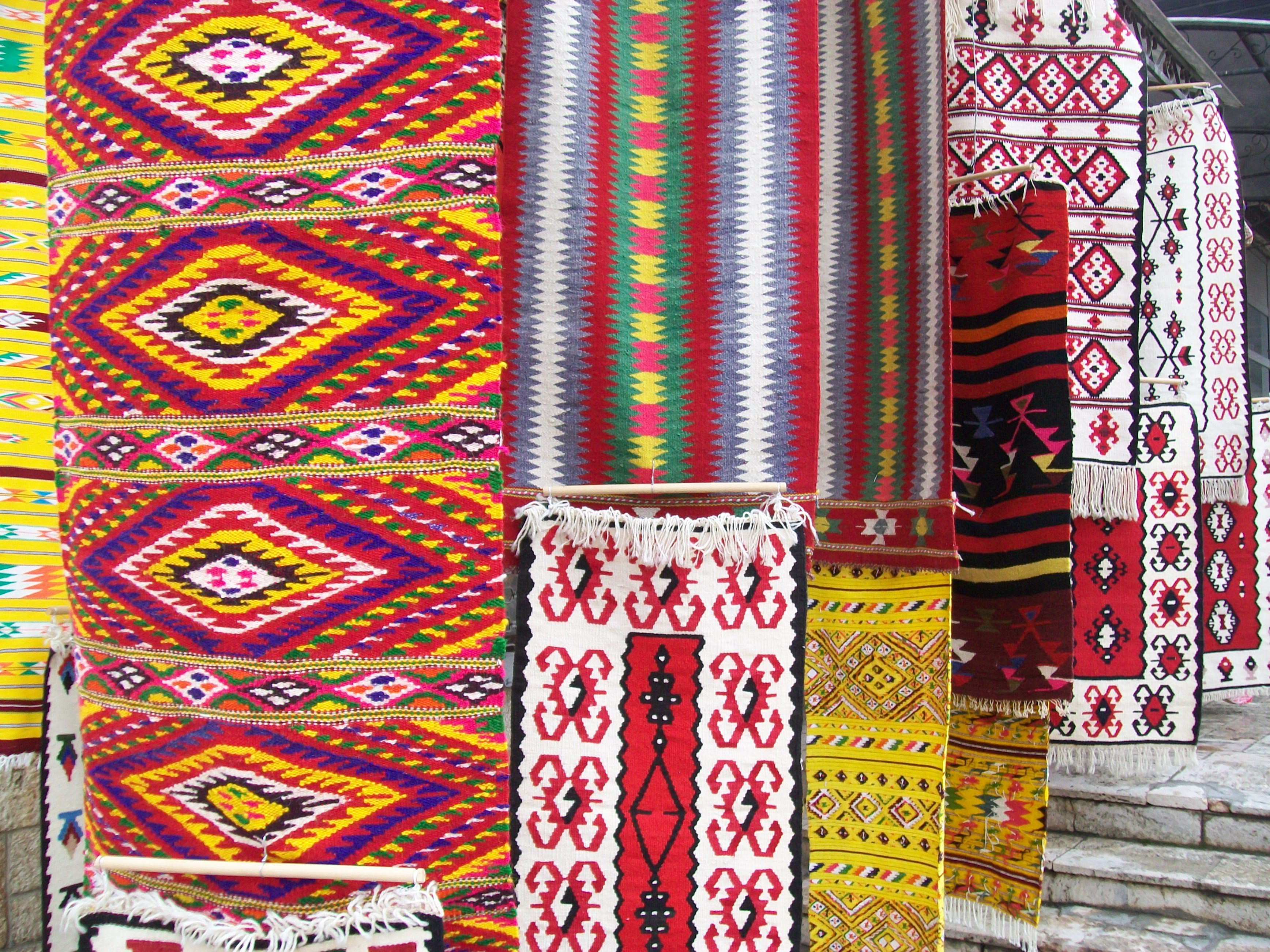 Македонски фолклор во ќилим. фотографија на платото пред Стоковната Куќа ,,Мост